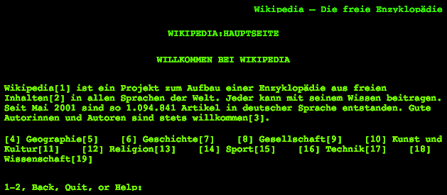 Wikipedia im Line Mode Browser